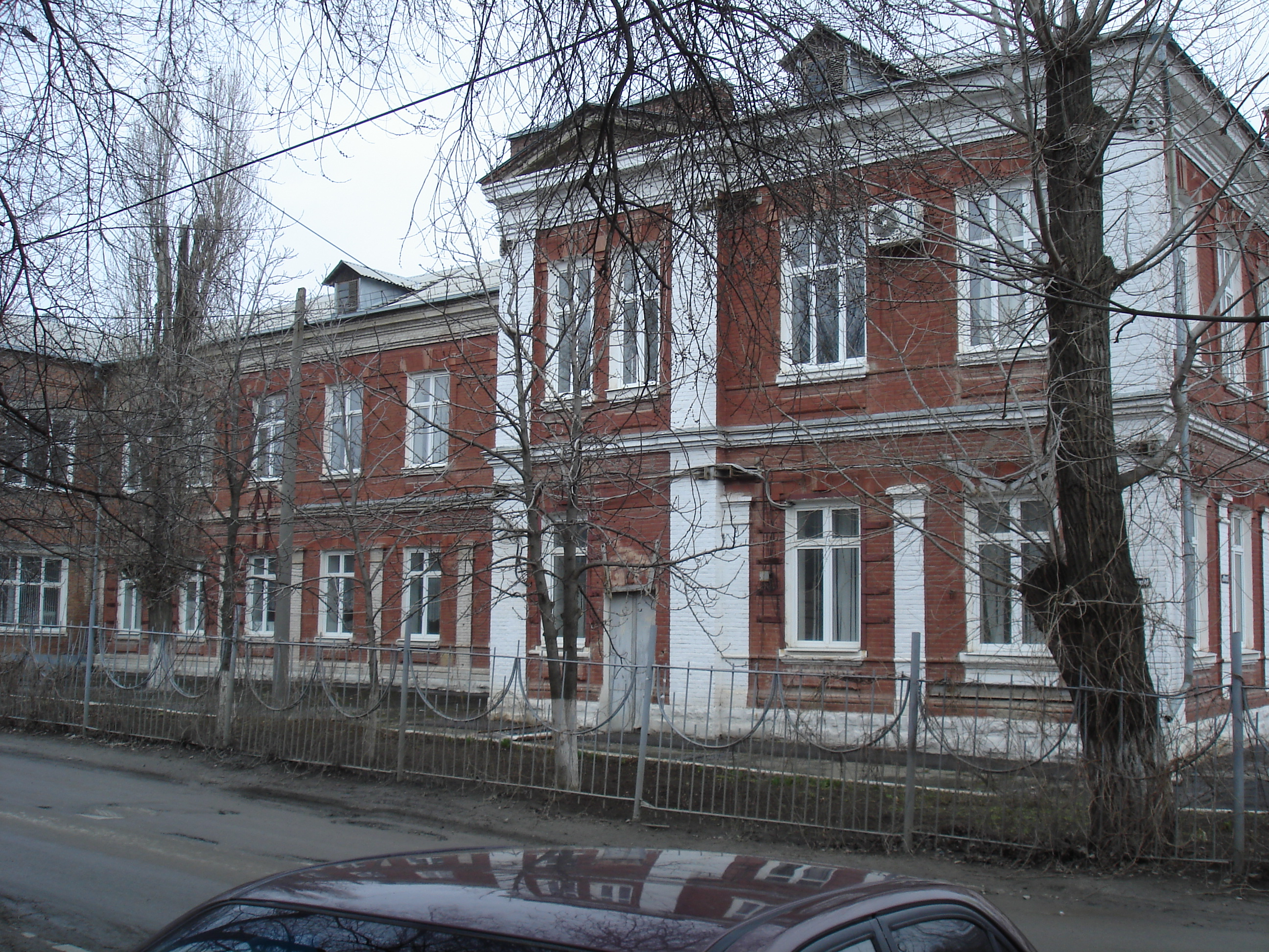 Каменск-Шахтинский, Ростовская область. Гимназия № 12 (вид на левое крыло здания).